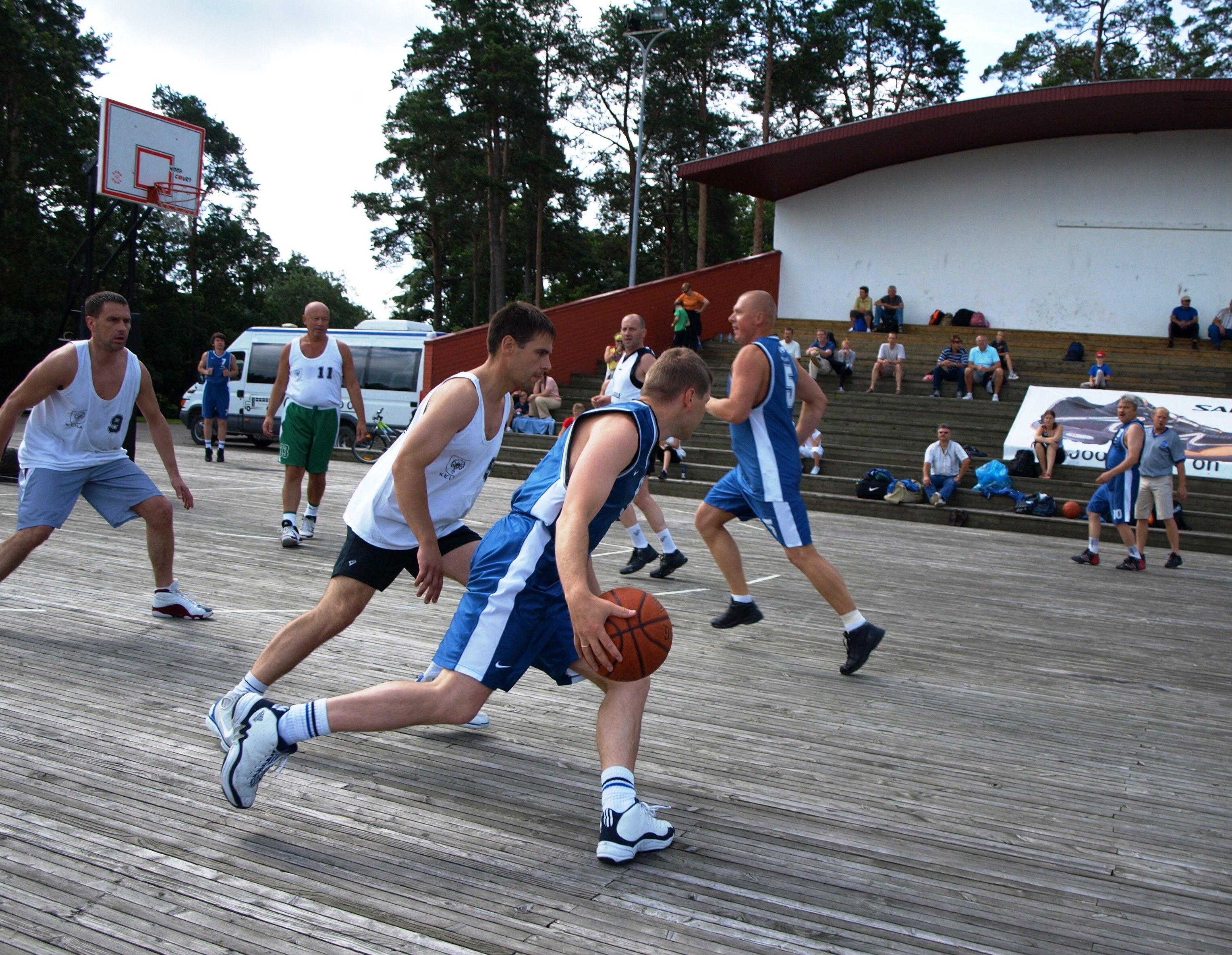 Tänavakorvpall Keilas: pilt tehtud Eesti linnapeade ja Riigikogu meeskonna kohtumisest.